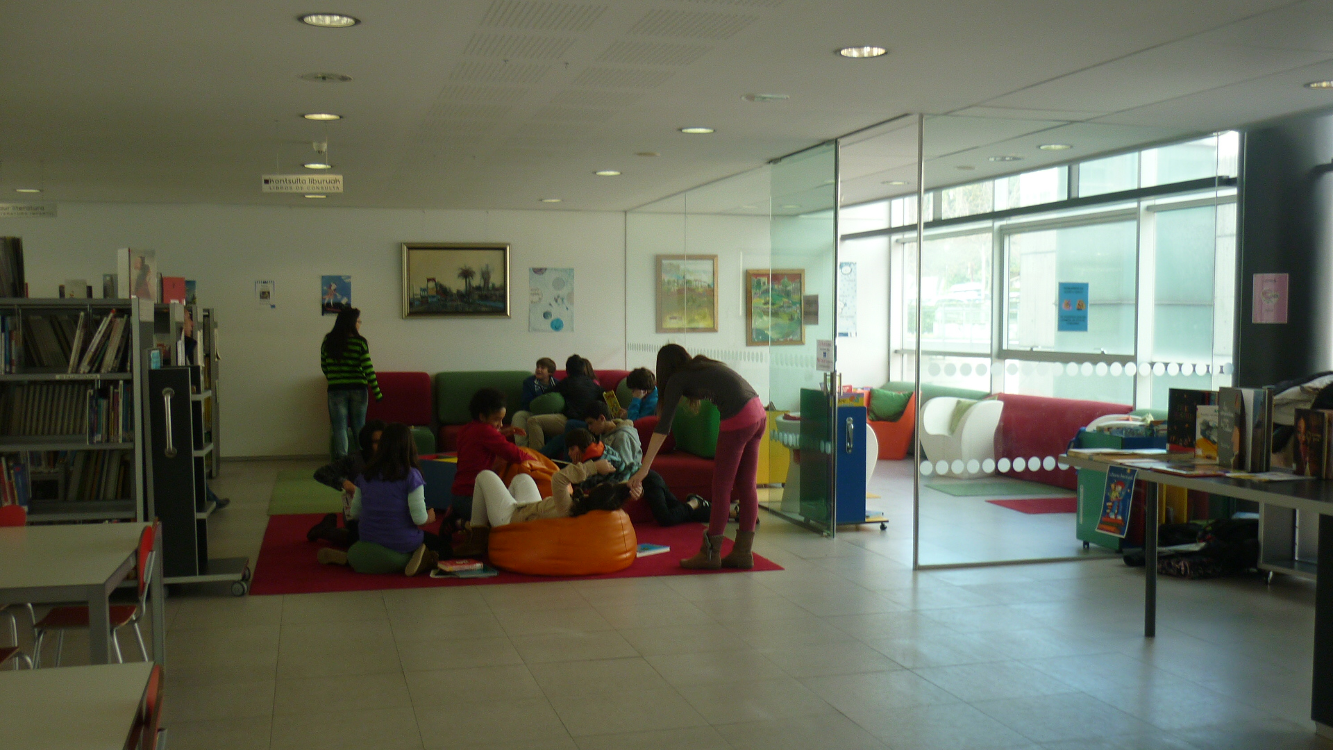 Kultur Leioako bigarren solairuko haur eta gazte liburutegia 43.326785,-2.986169